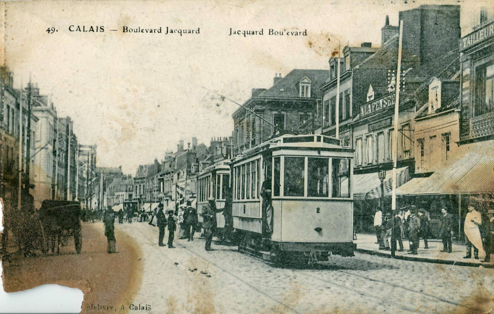 Carte postale ancienne éditée par Lefèbvre à Calais, n°49 Calais - Boulevard Jacquard Vue en gros plan d'une rame du tramway de Calais.